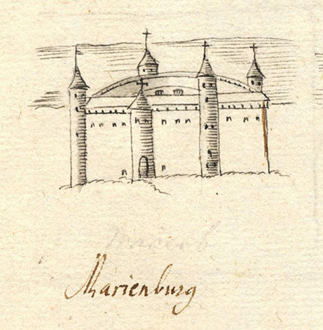 Alulinna linnuse kujutis XVII sajandist. (Jürgen Helms, 1628–1643)